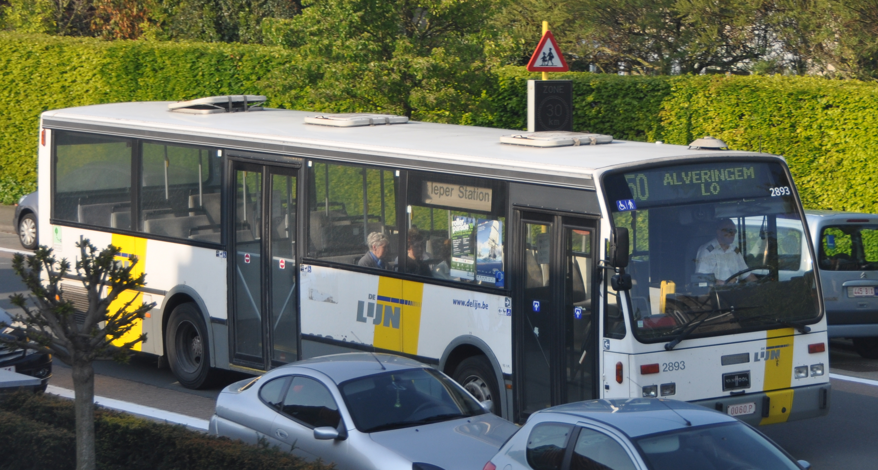 bus komende van Veurne Station op weg naar Ieper Station